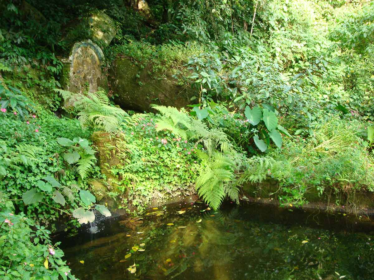 Fonte da Saudade e tanque para lavagem de roupas